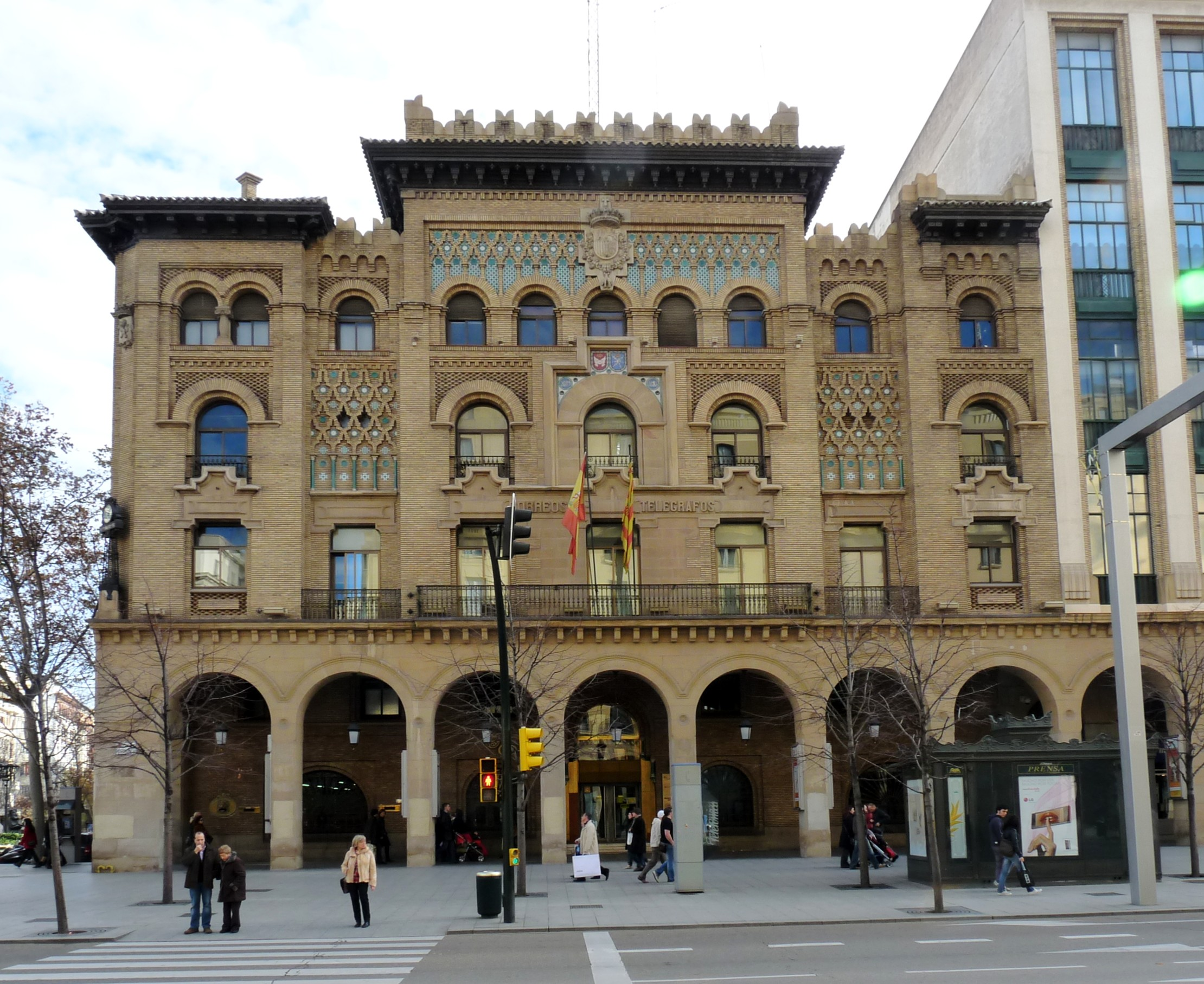 Zaragoza - Correos - Fachada